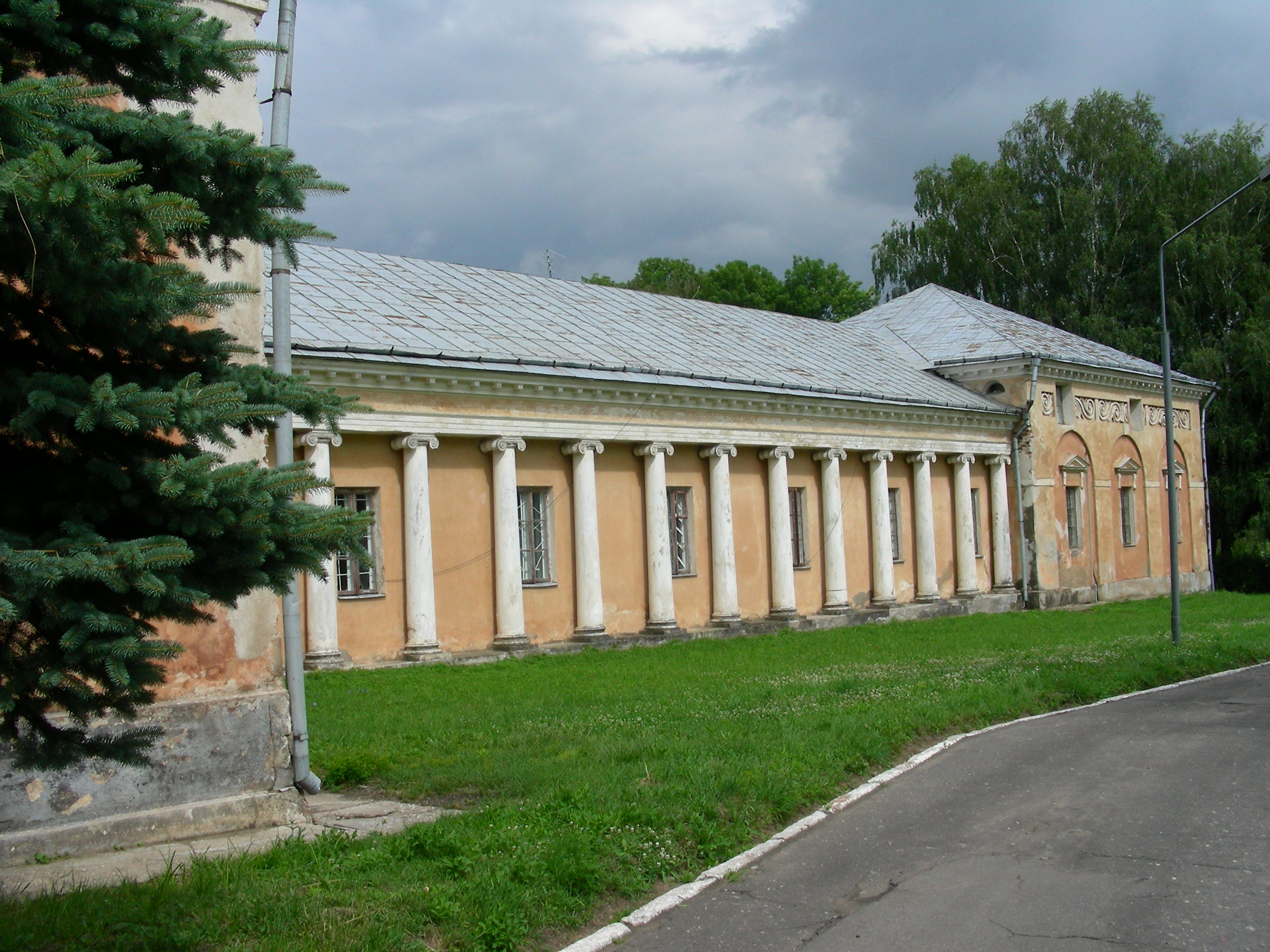 Беларуская (тарашкевіца): Былы палацава-паркавы ансамбль:палацпарк. в. Сноў This is a photo of Belarusian heritage monument. Reference number: 612Г000500 ( WLM)